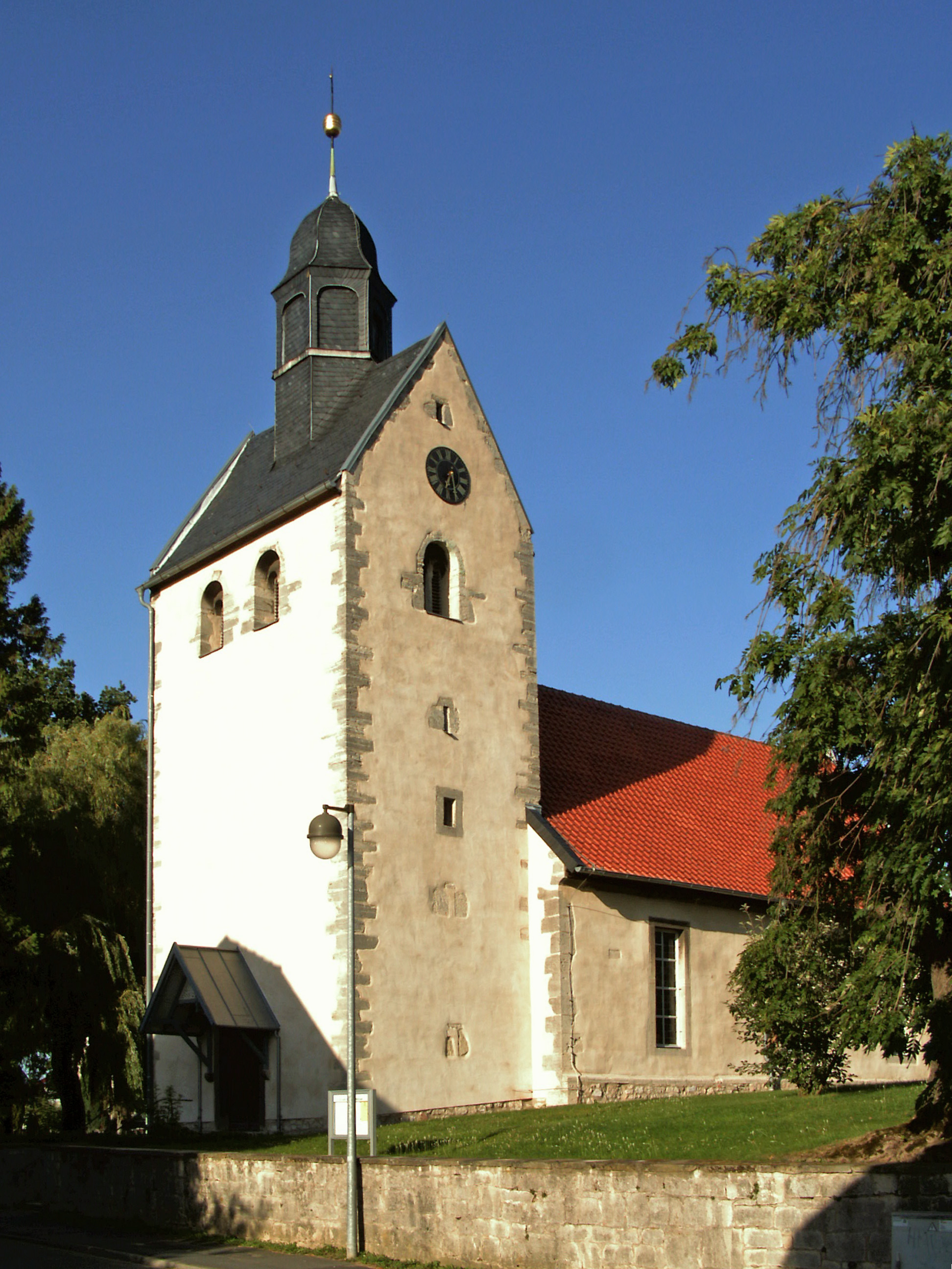 Evangelisch-lutherische St. Michaelskirche in Cremlingen, Landkreis Wolfenbüttel